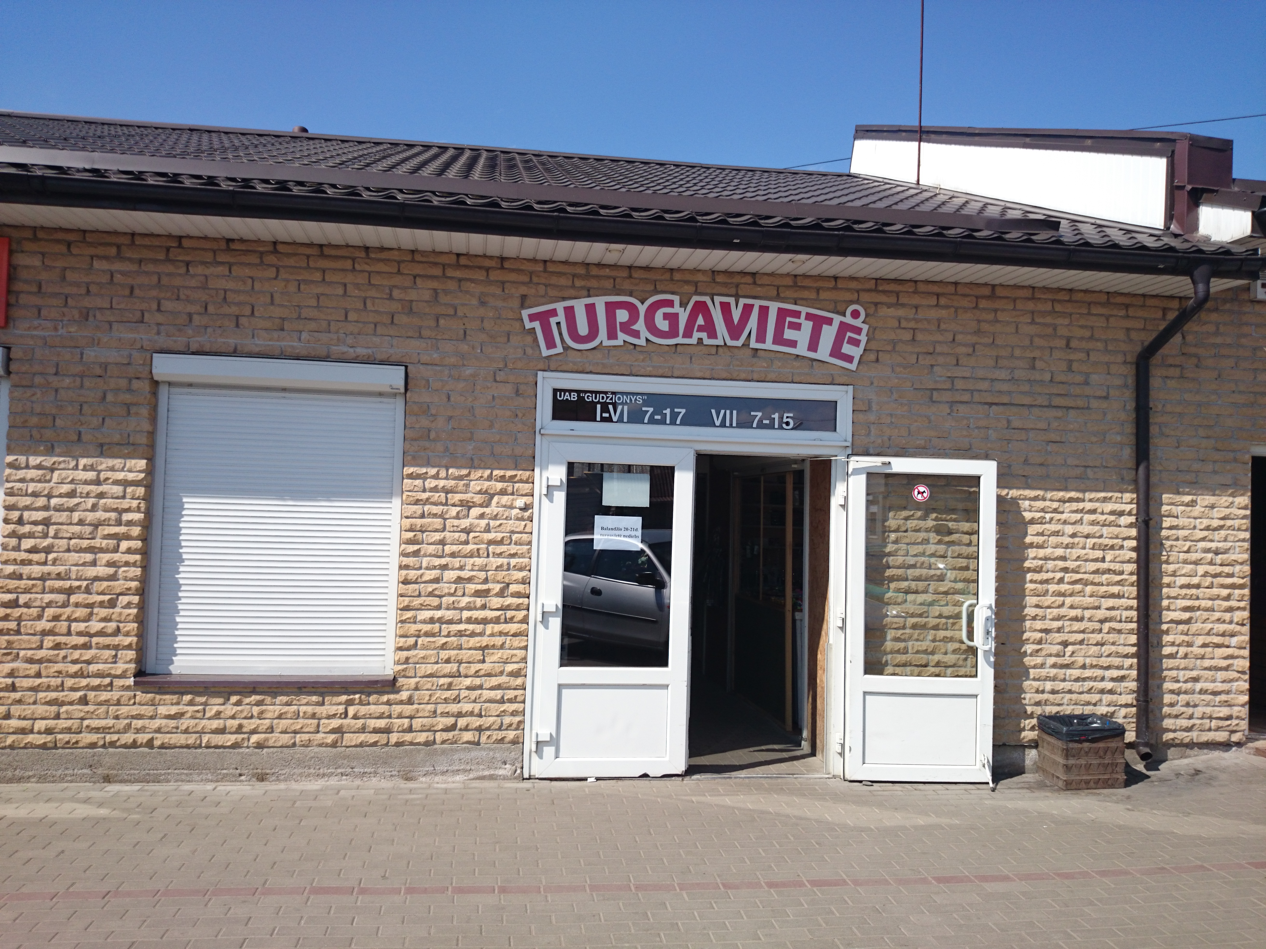 Jonava